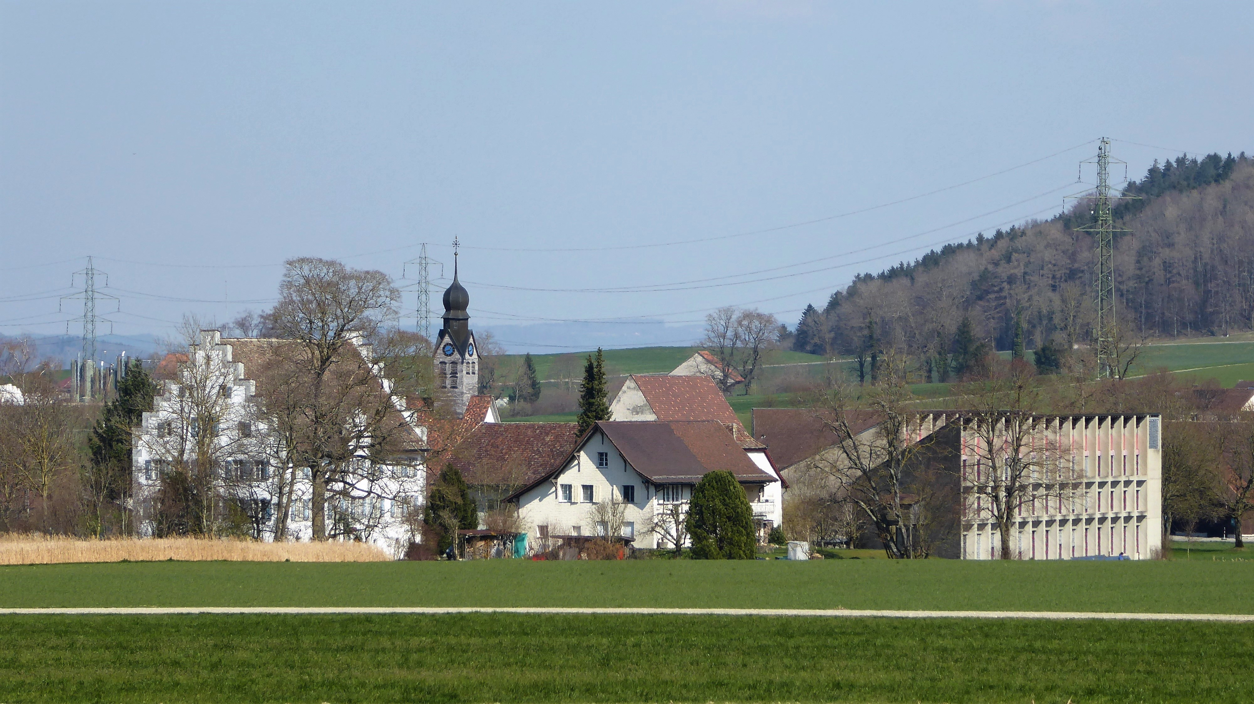 Kloster Tänikon